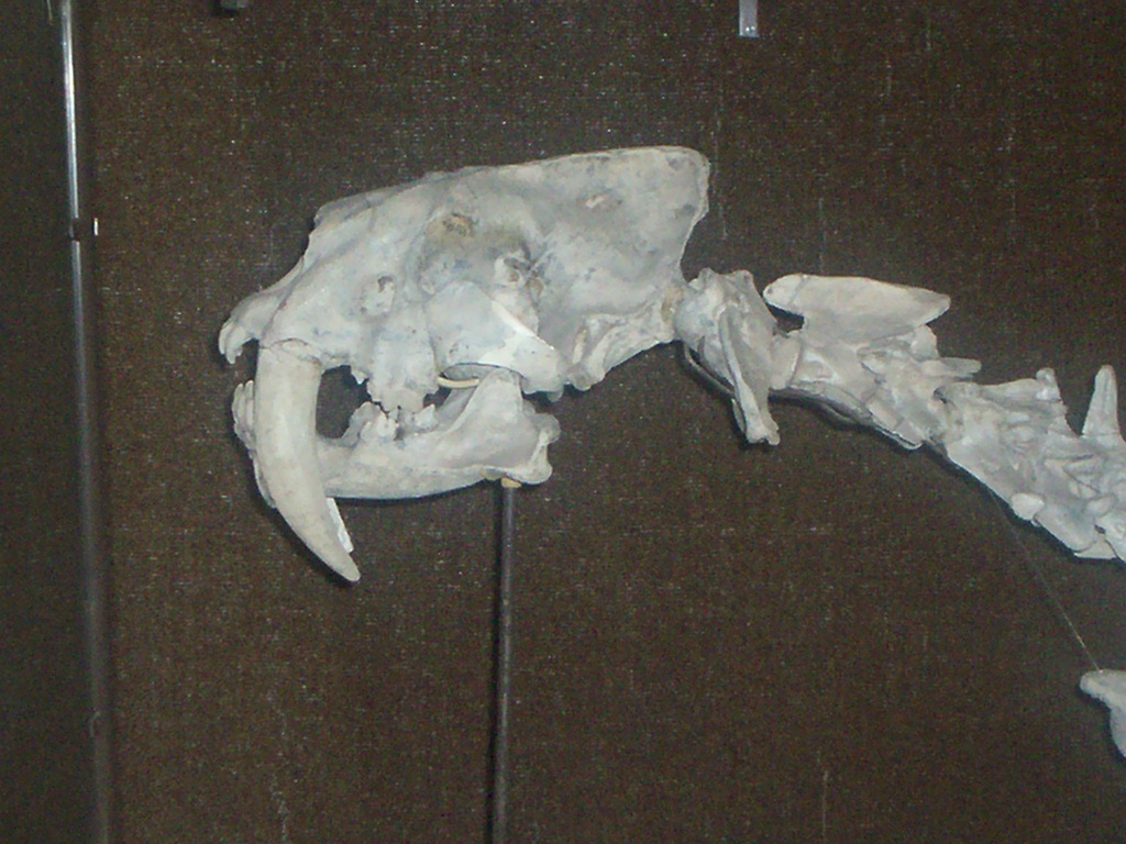 Detalle del cráneo del Smilodon perteneciente a la colección del Museo de La Plata. Foto tomada el 3 de noviembre de 2005.